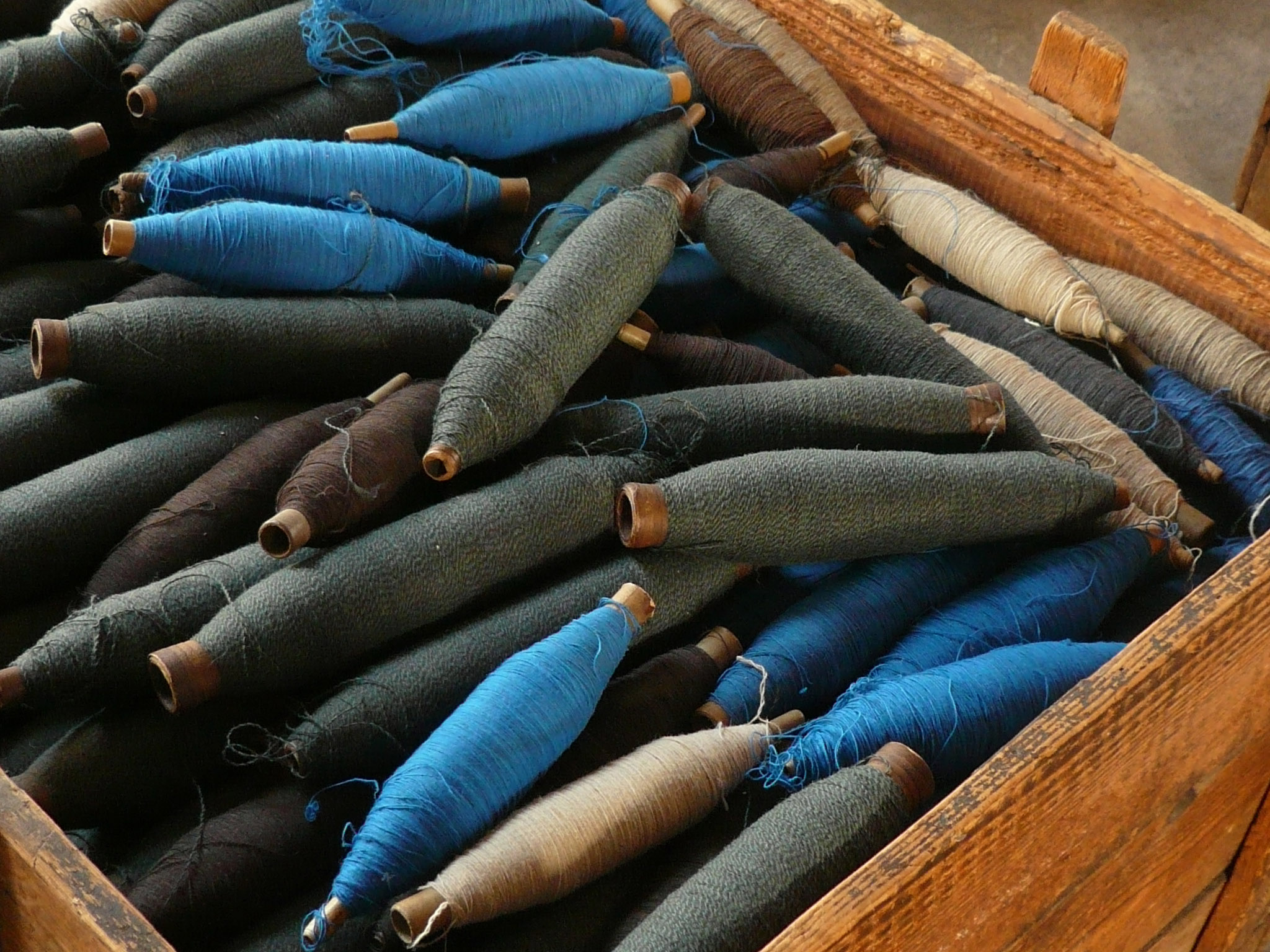 Garnrollen aus der Tuchfabrik Müller, aus der Zeit vor der Betriebsschließung (1961)